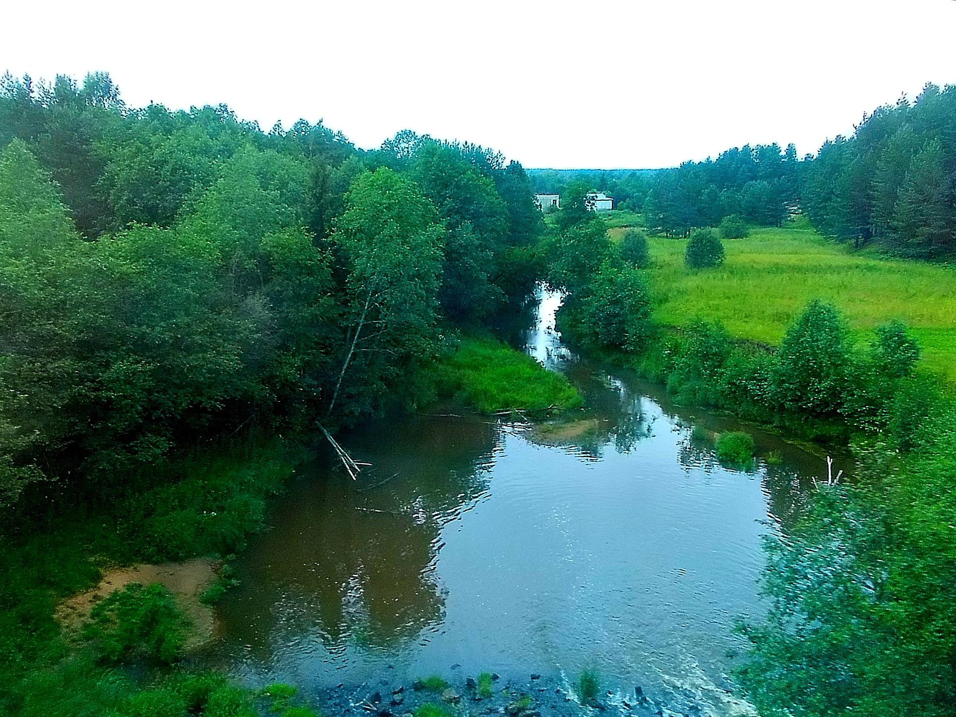 Река Каномка